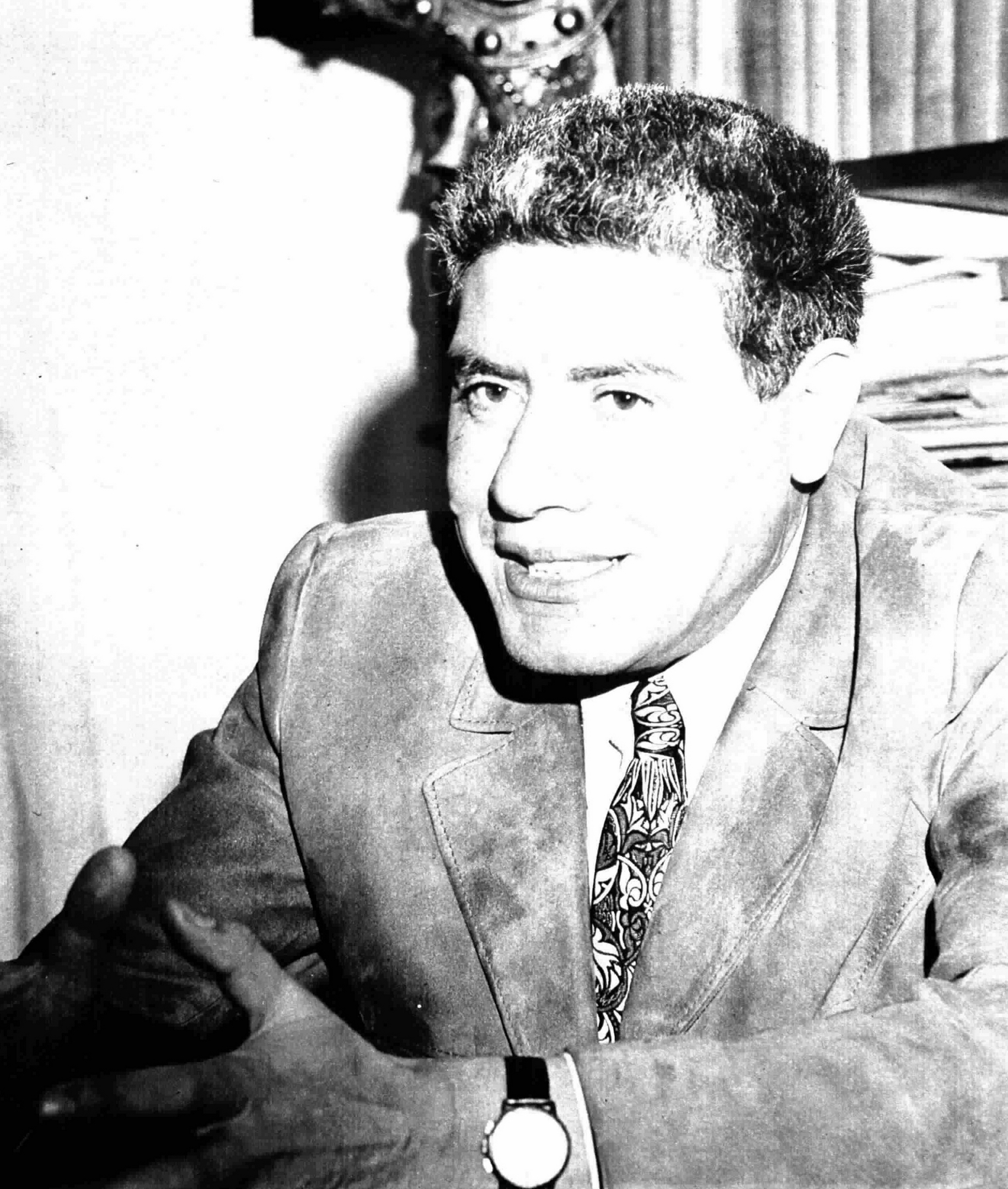 Italian author Fortunato Pasqualino